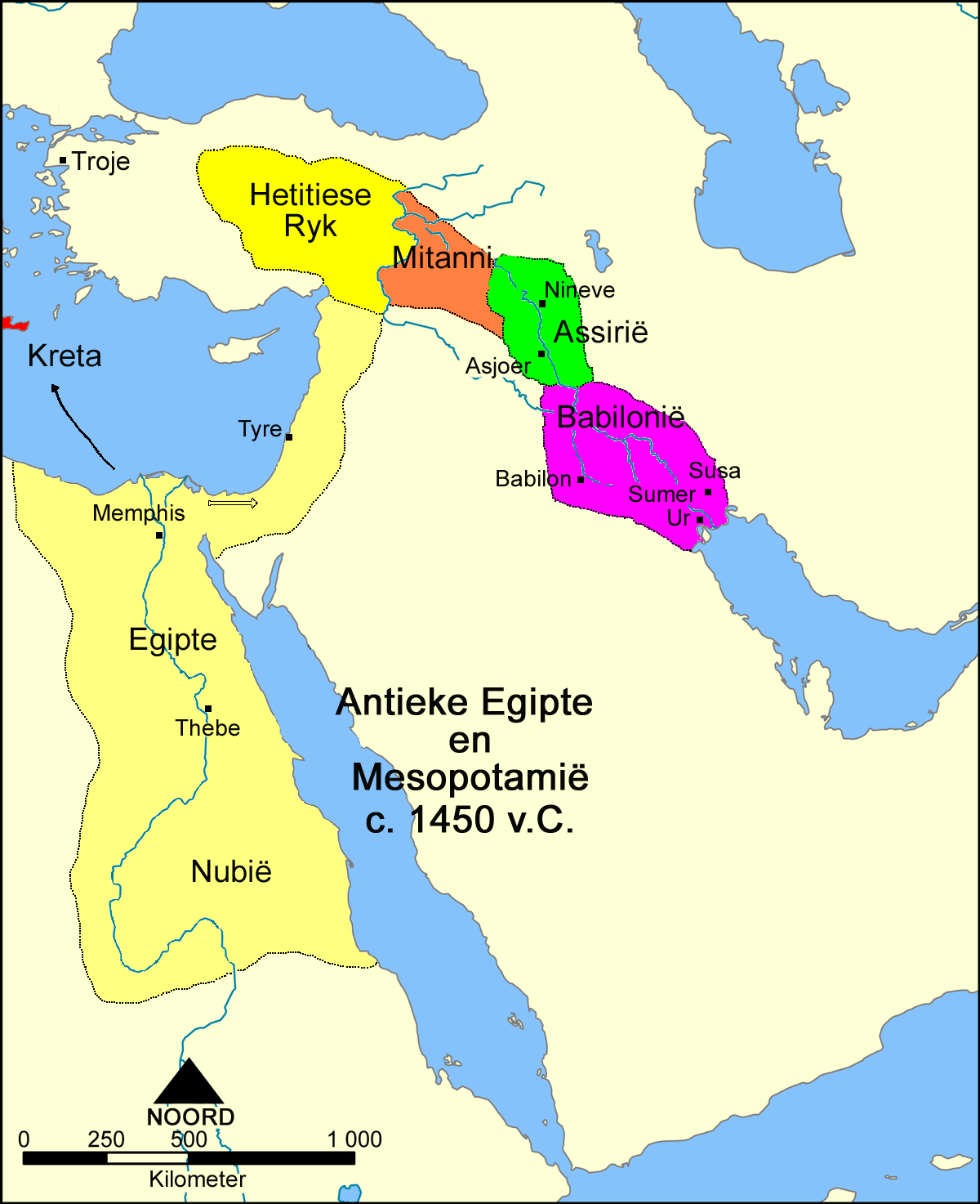 Antieke Egipte en Mesopotamië, c. 1450 v.C.